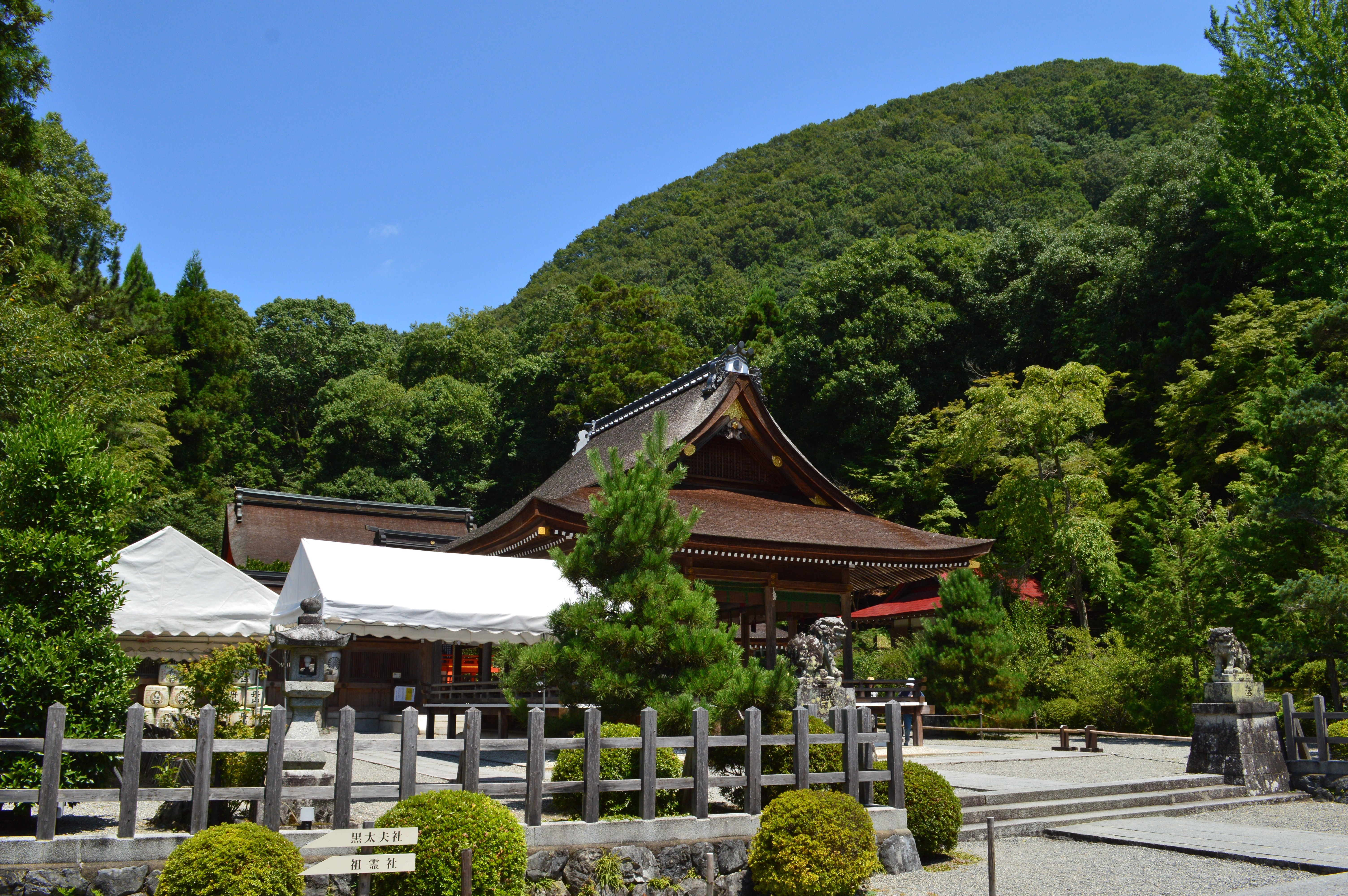 出雲大神宮 境内